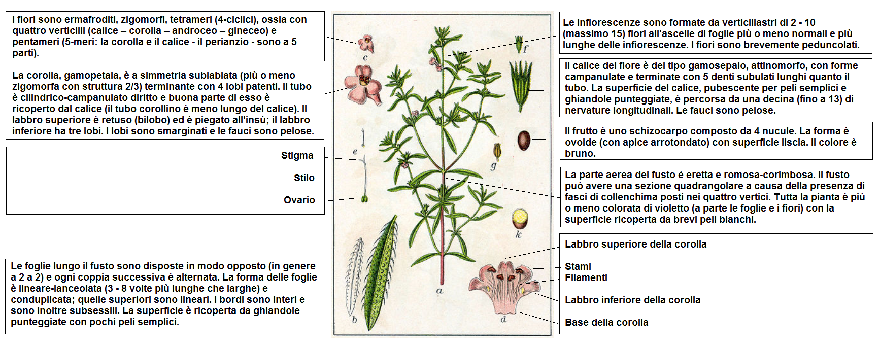 Satureja hortensis - Descrizione della pianta